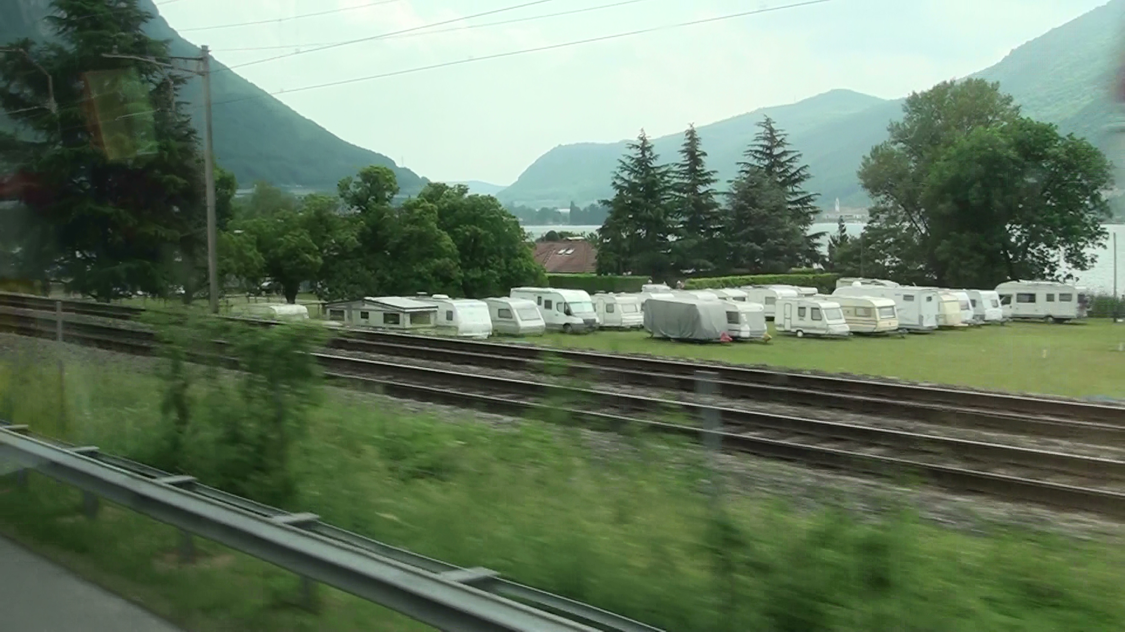 Melano, Switzerland